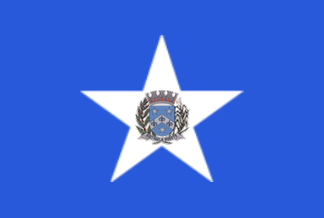 Bandeira de Estrela d'Oeste - SP - Brasil.